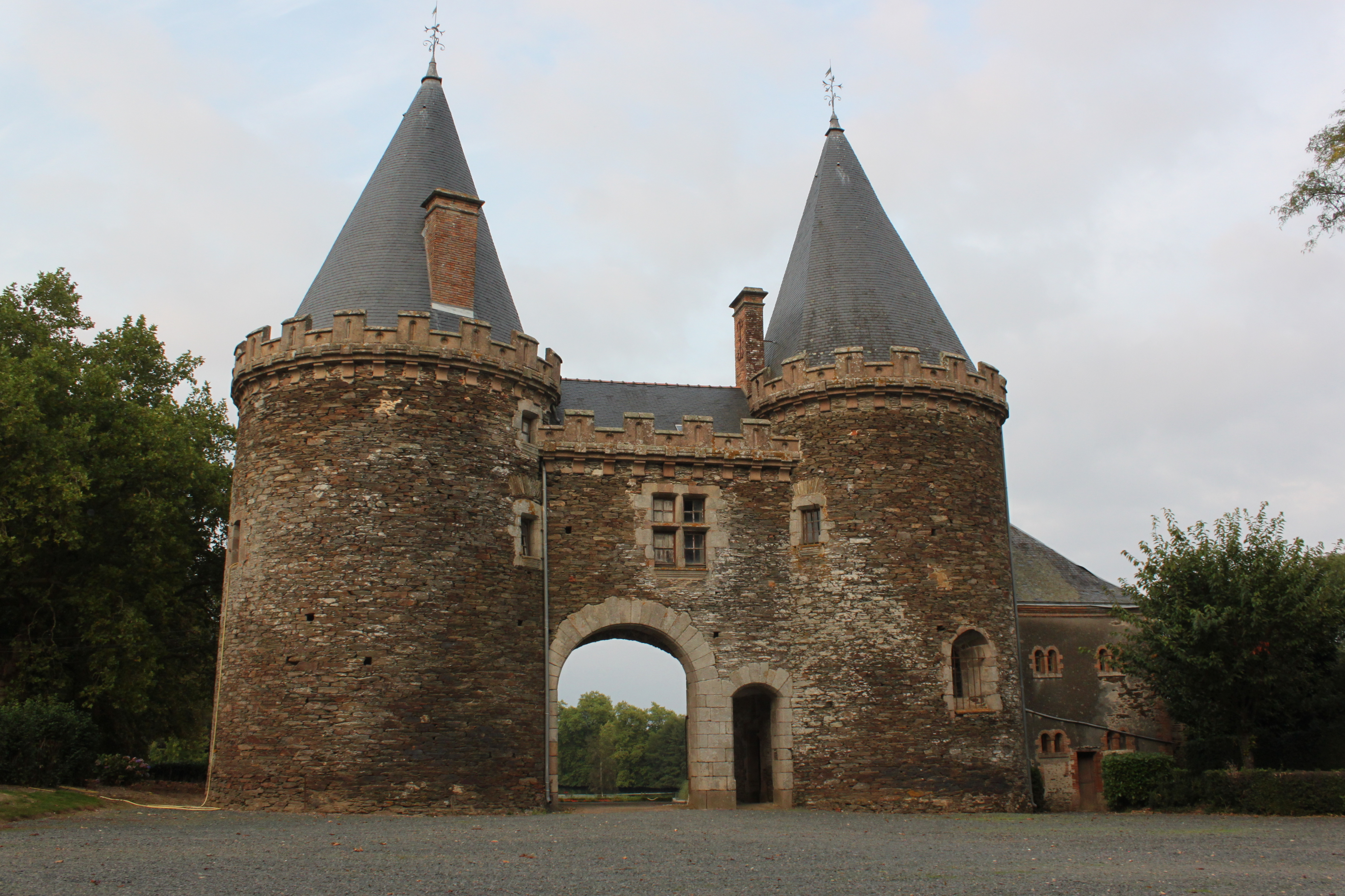 Château du Plessis, Fr-49-Gesté.